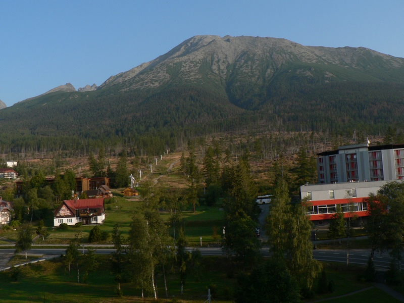 Slavkovský štít z Nového Smokovce.